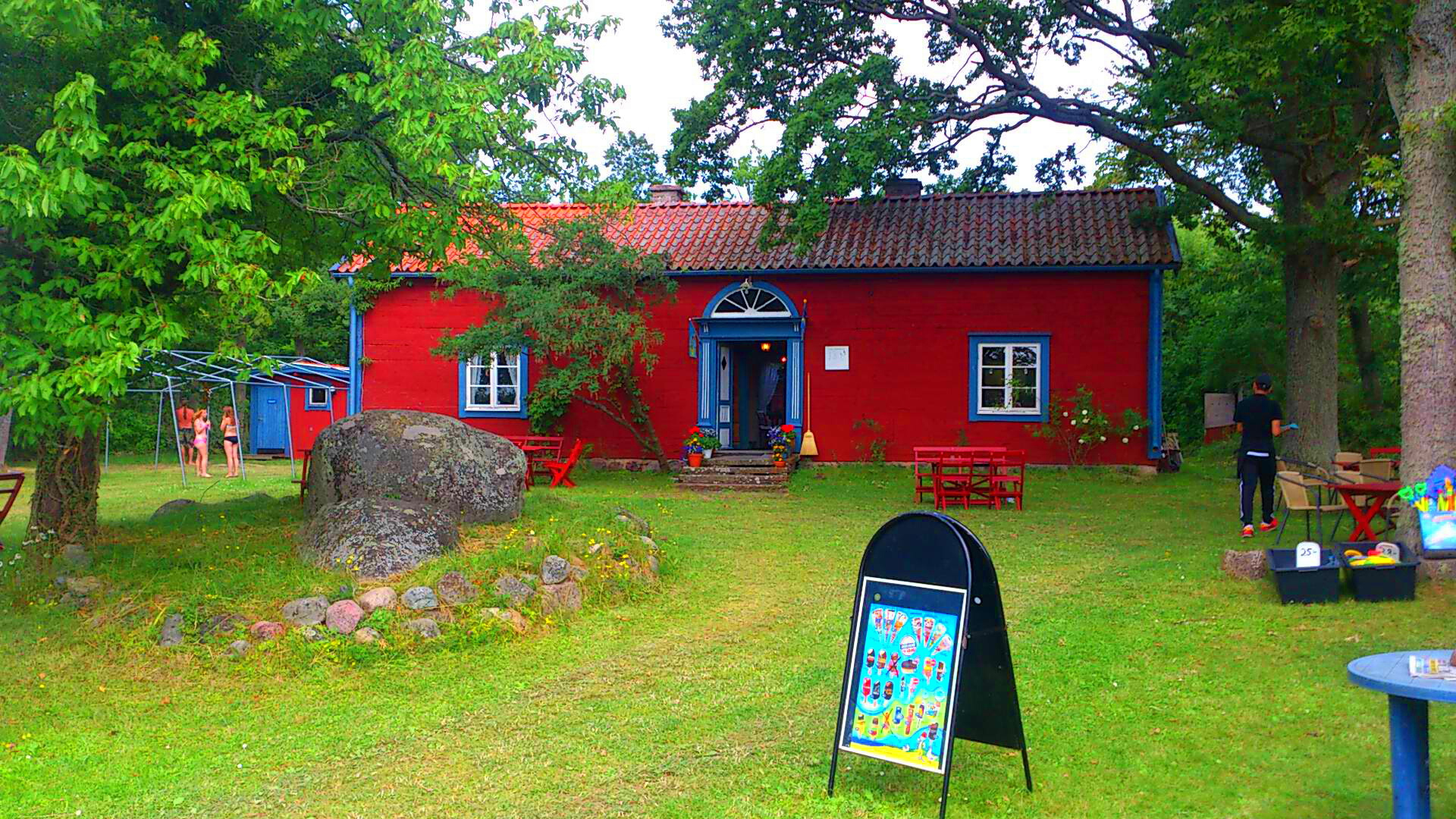 Sjöstugan Borgholm Öland nr2 140708